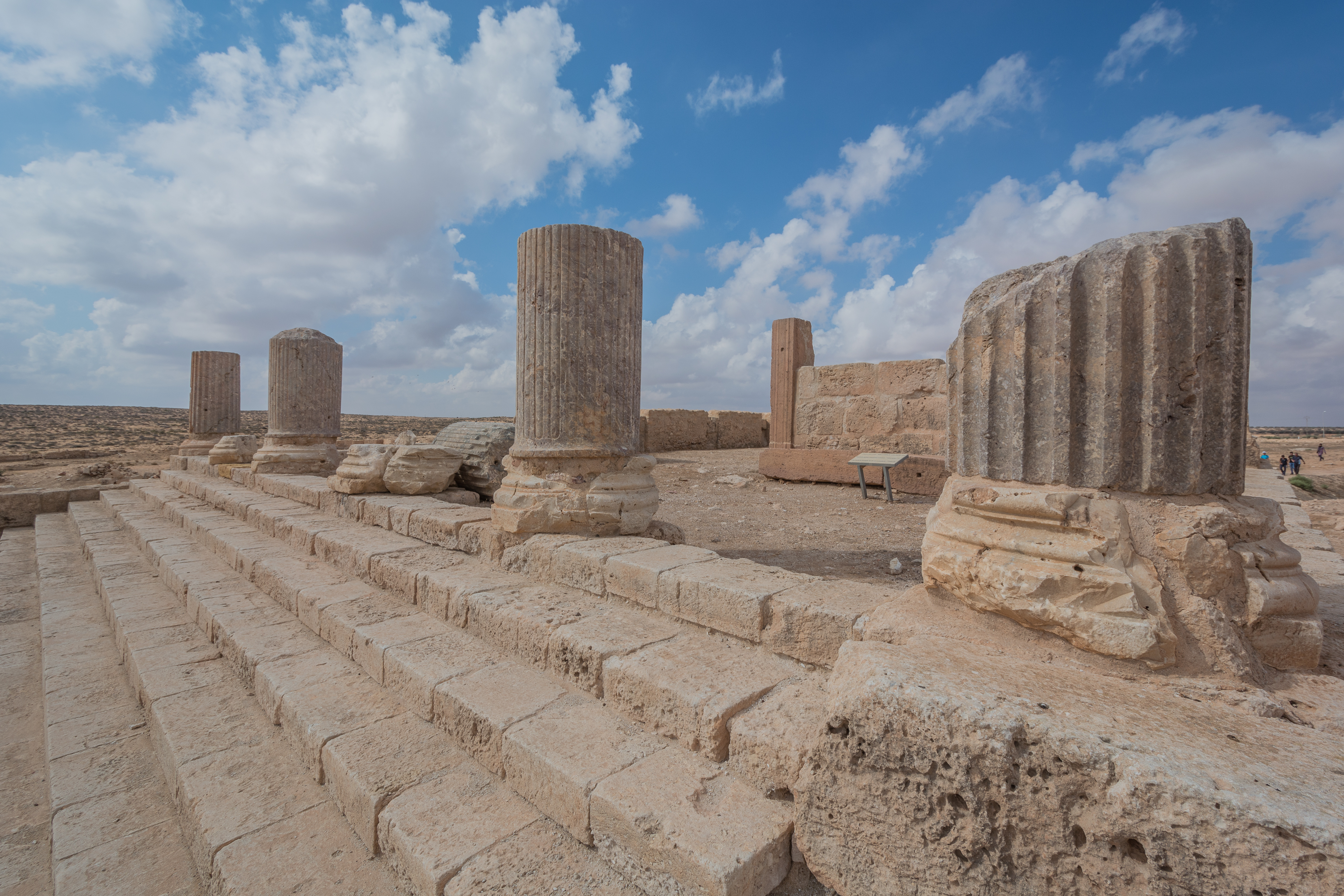 Forum et ses annexes